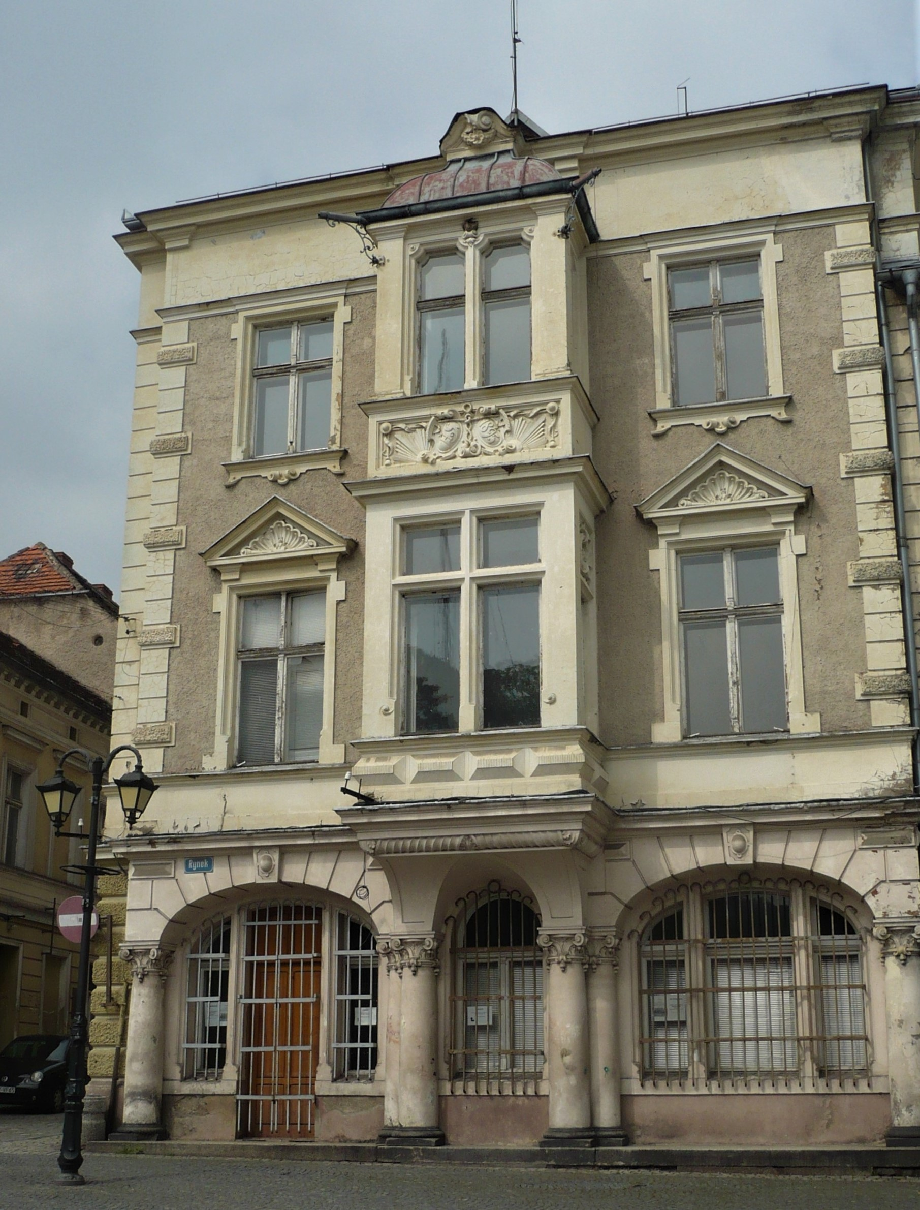 Złoty Stok